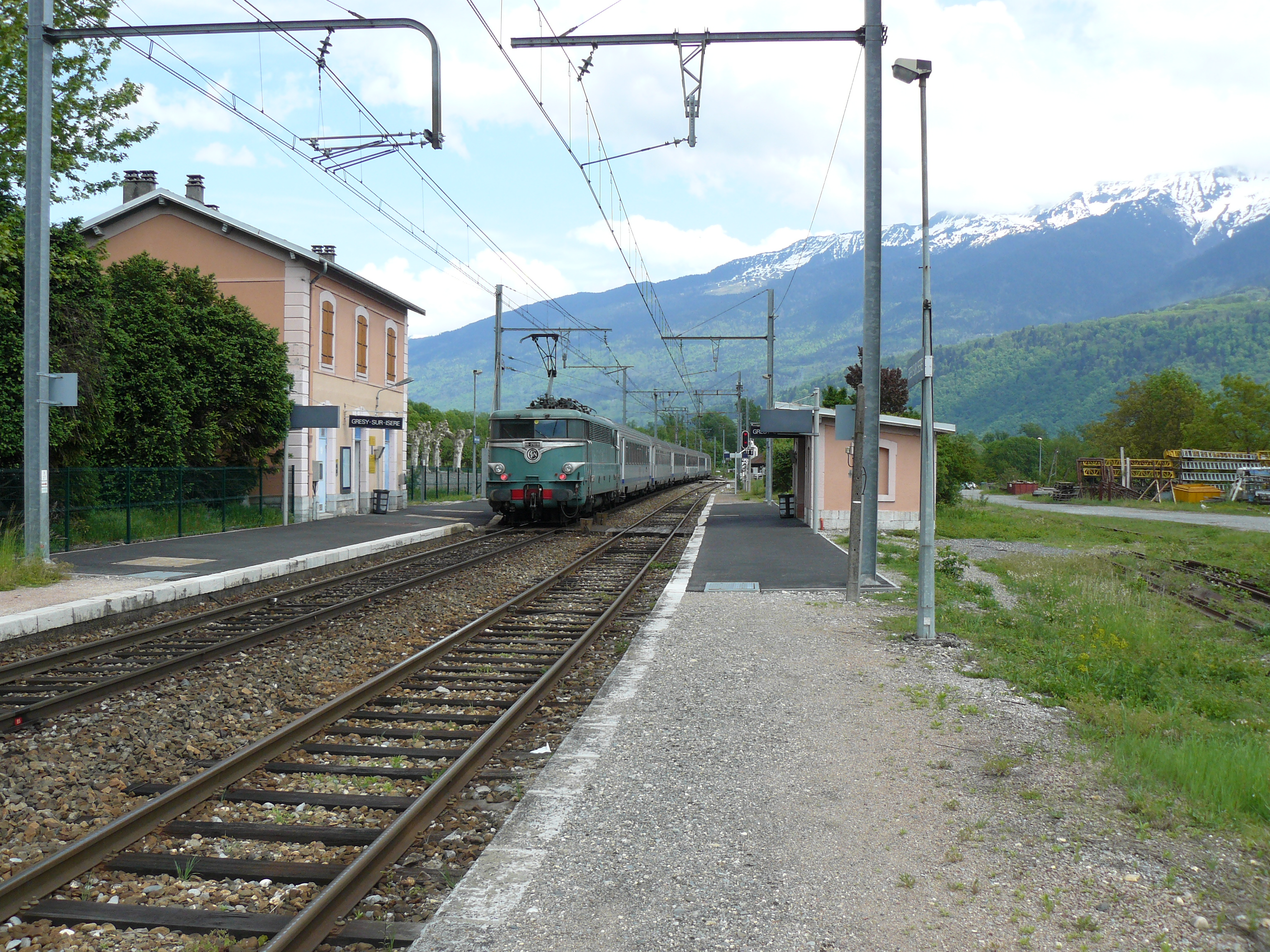 Gare de Grésy-sur-Isère (Savoie France)